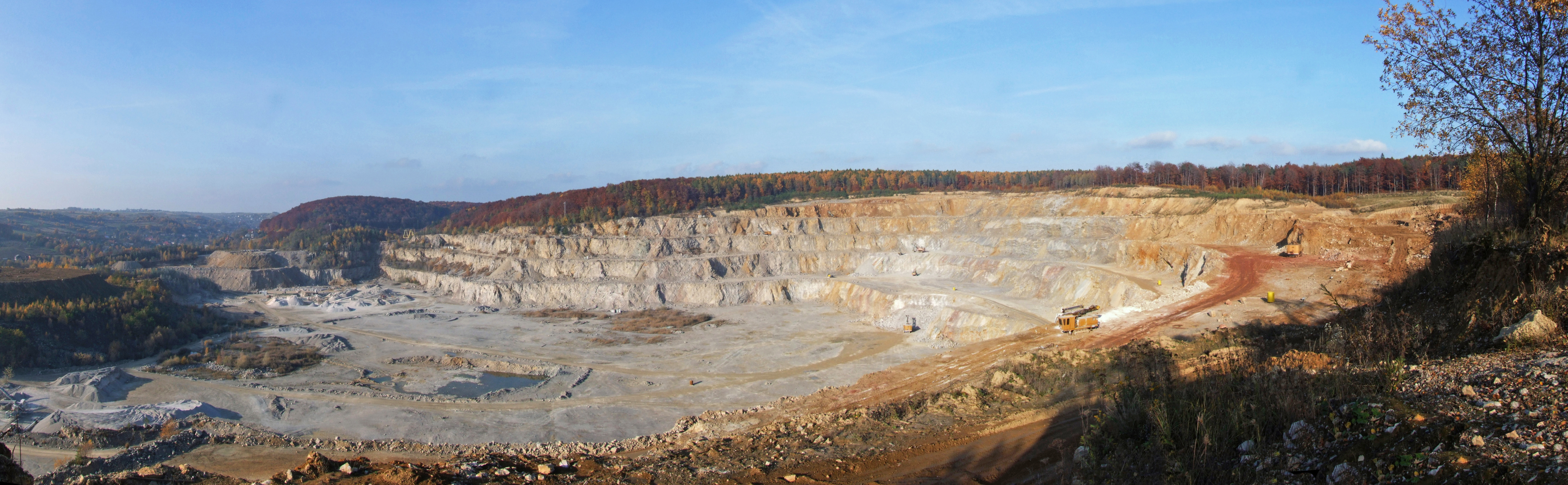 Kamieniołom w Krzeszowicach-Czatkowicach